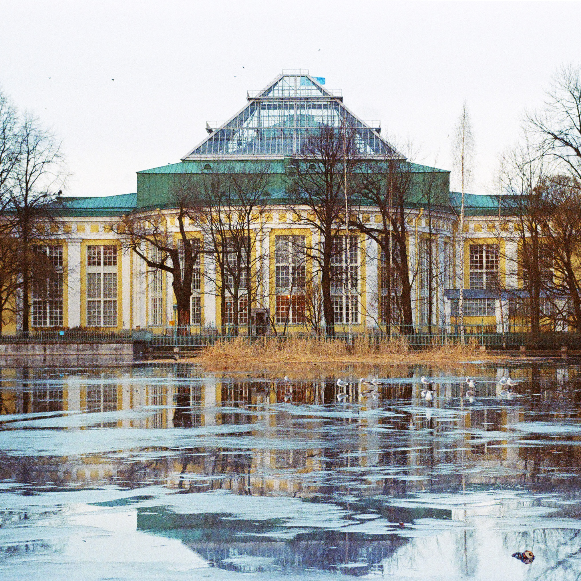 Сад Таврический с прудом (Санкт-Петербург и Лен.область, Санкт-Петербург, Потемкинская улица, 2-4, Кирочная улица, 50, Таврическая улица, 8)